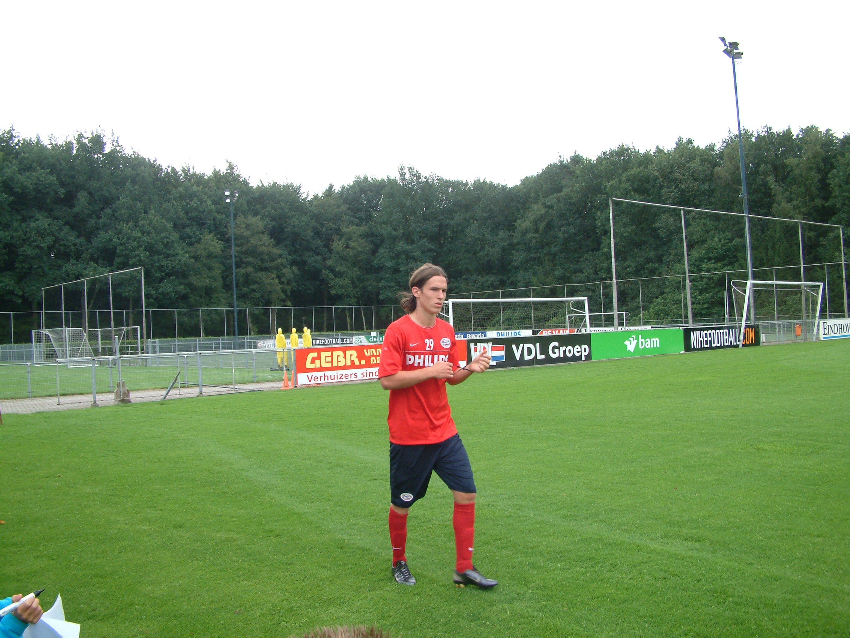 Stijn Wuytens, speler van PSV.